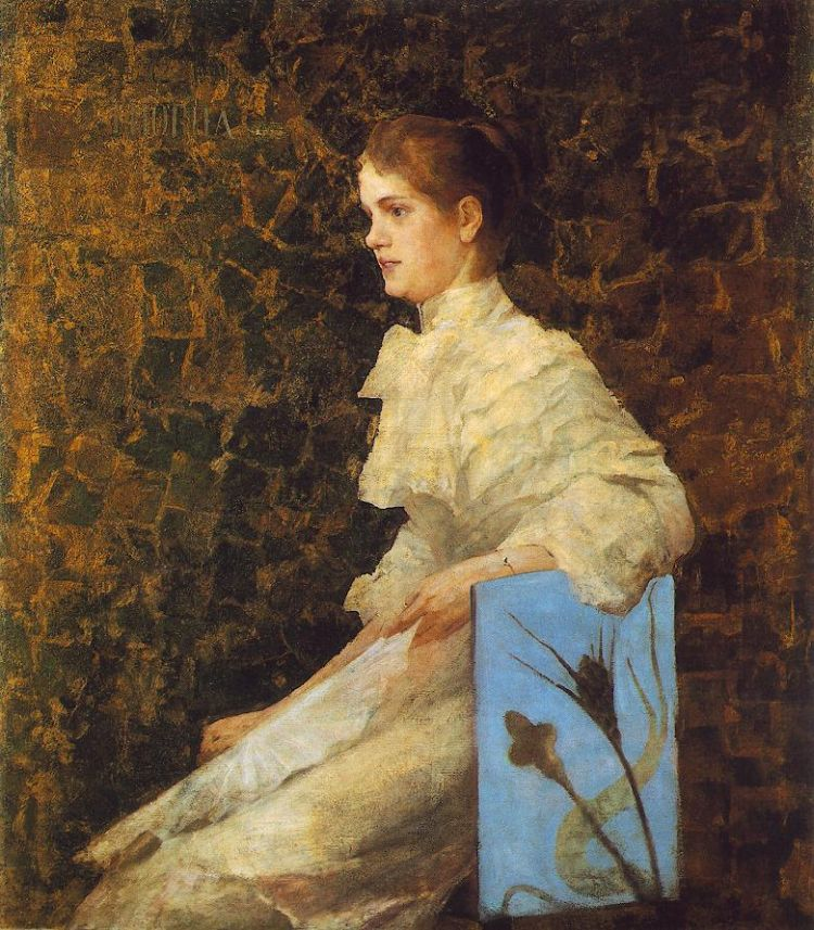 Wife of Béla Iványi-Grünwald